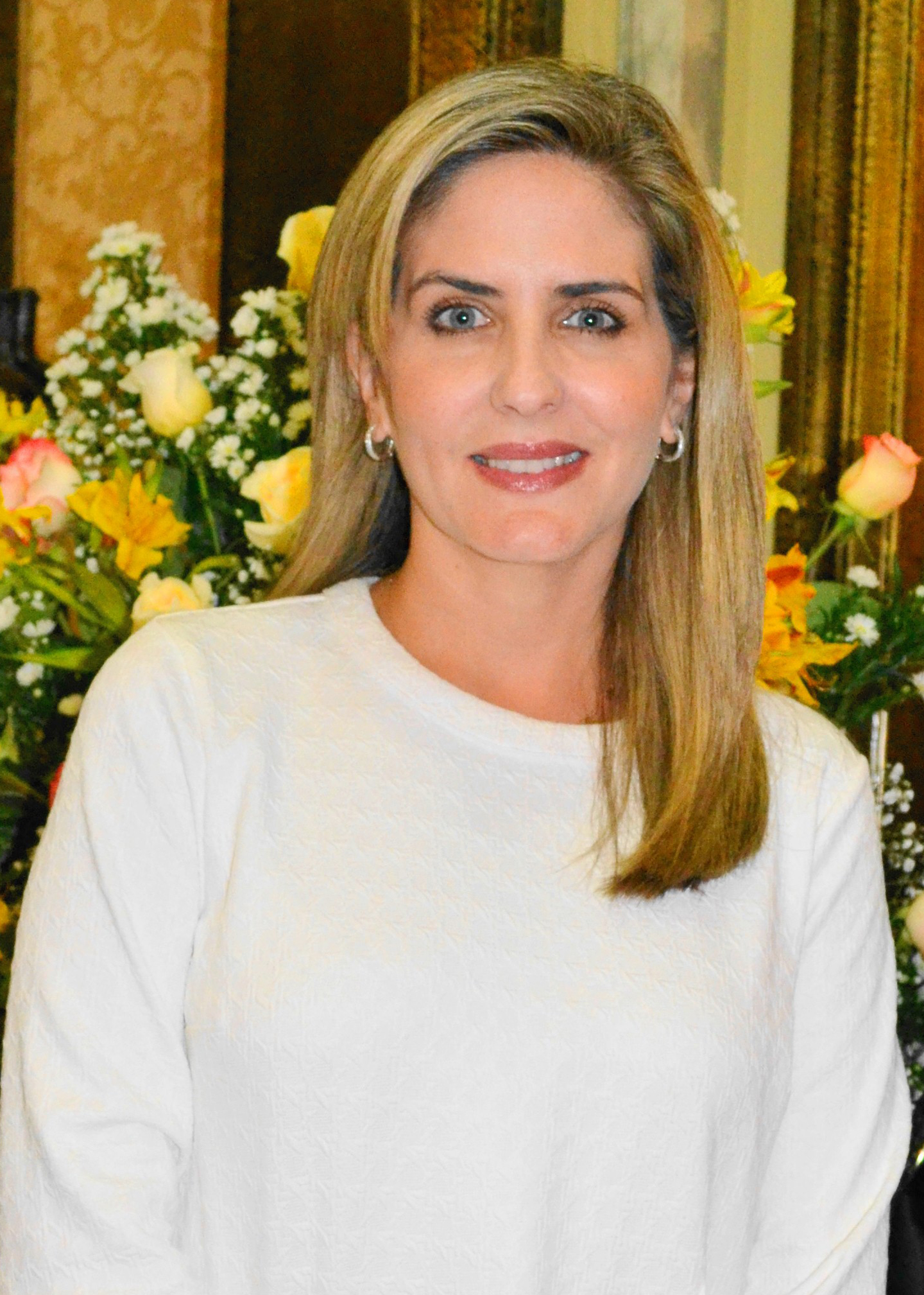 Doménica Tabacchi, vice alcaldesa de Guayaquil.